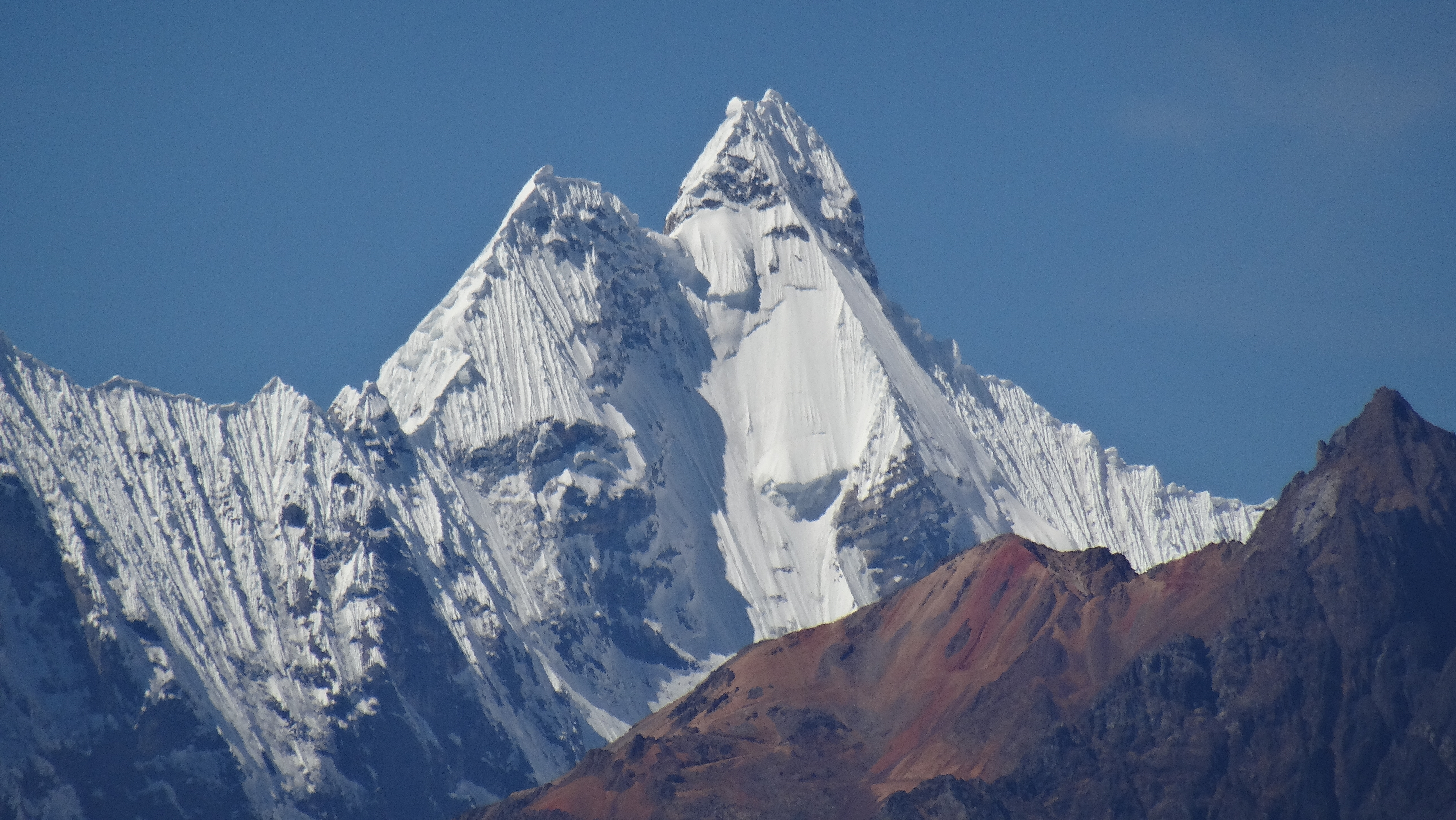 Pared oeste del nevado Jirishanca visto desde el mirador de Chiquián.